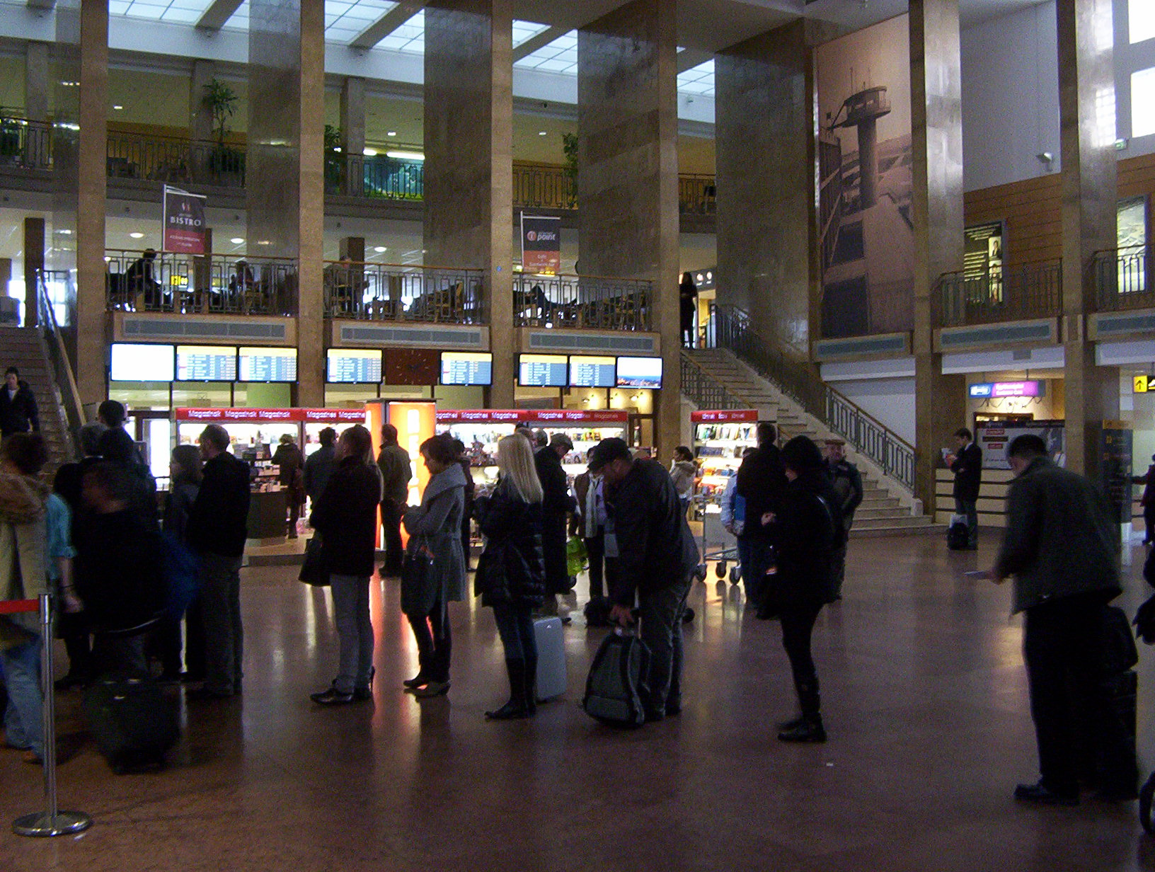 A Liszt Ferenc Repülőtér 1-es termináljának várócsarnoka a bejárat felől, bal oldalról